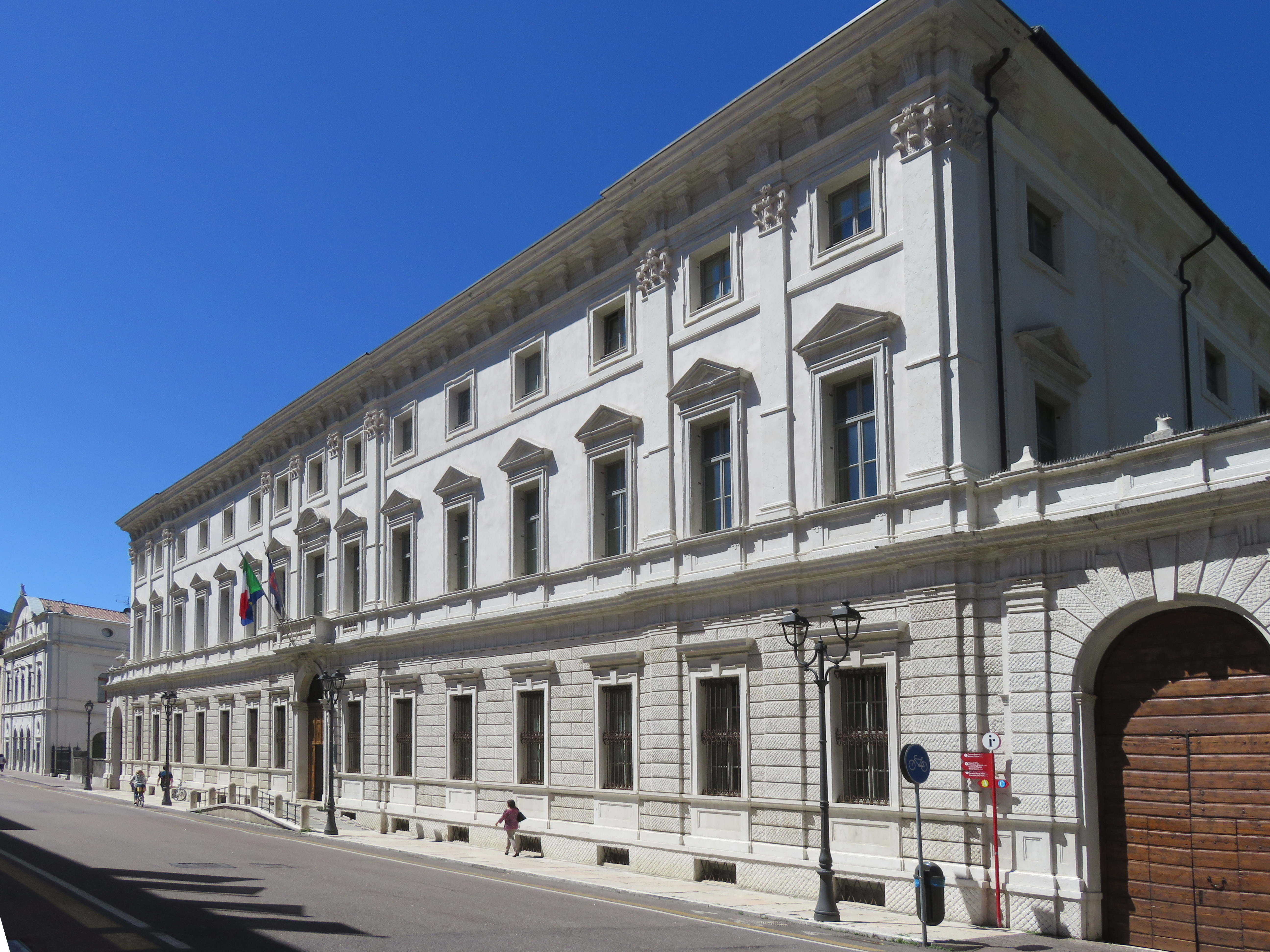 Palazzo Piomarta in corso Bettini. A sinistra visibile il teatro Zandonai